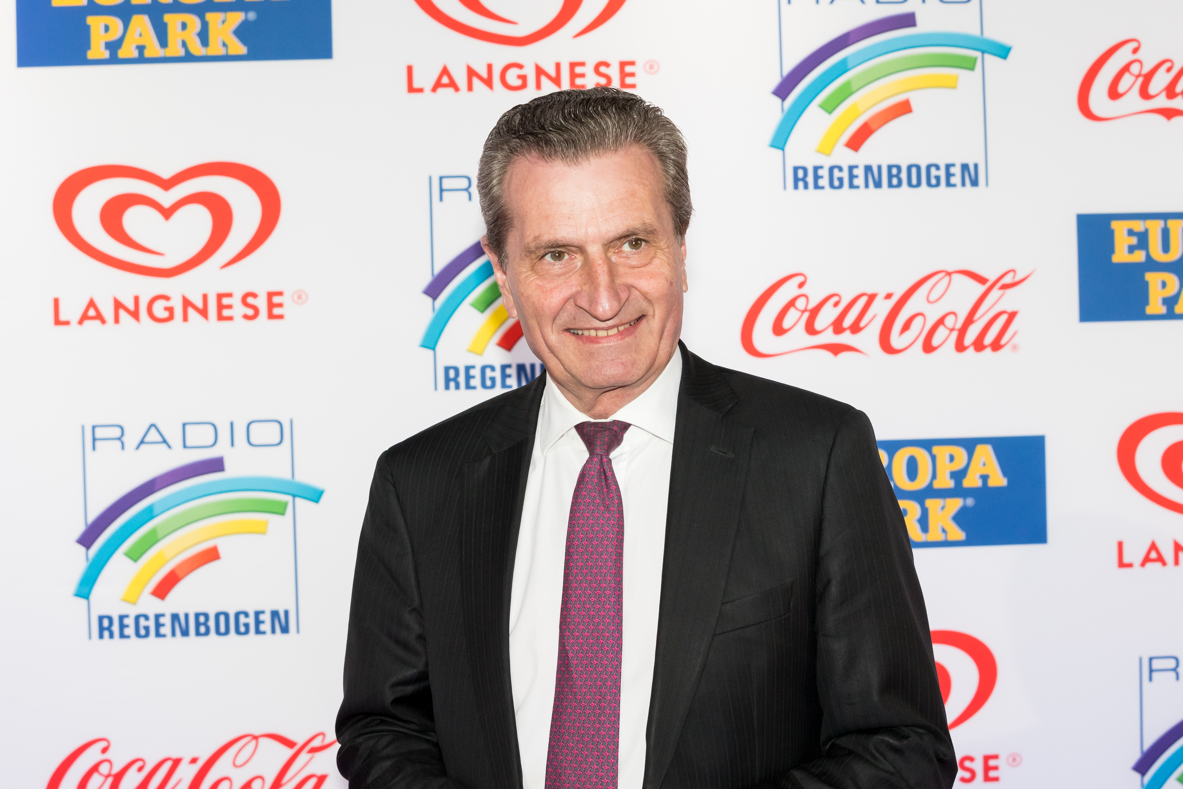 Günther Oettinger during Radio Regenbogen Award 2019 at Europapark, Rust, Baden-Württemberg, Germany on 2019-04-12, Photo: Sven Mandel